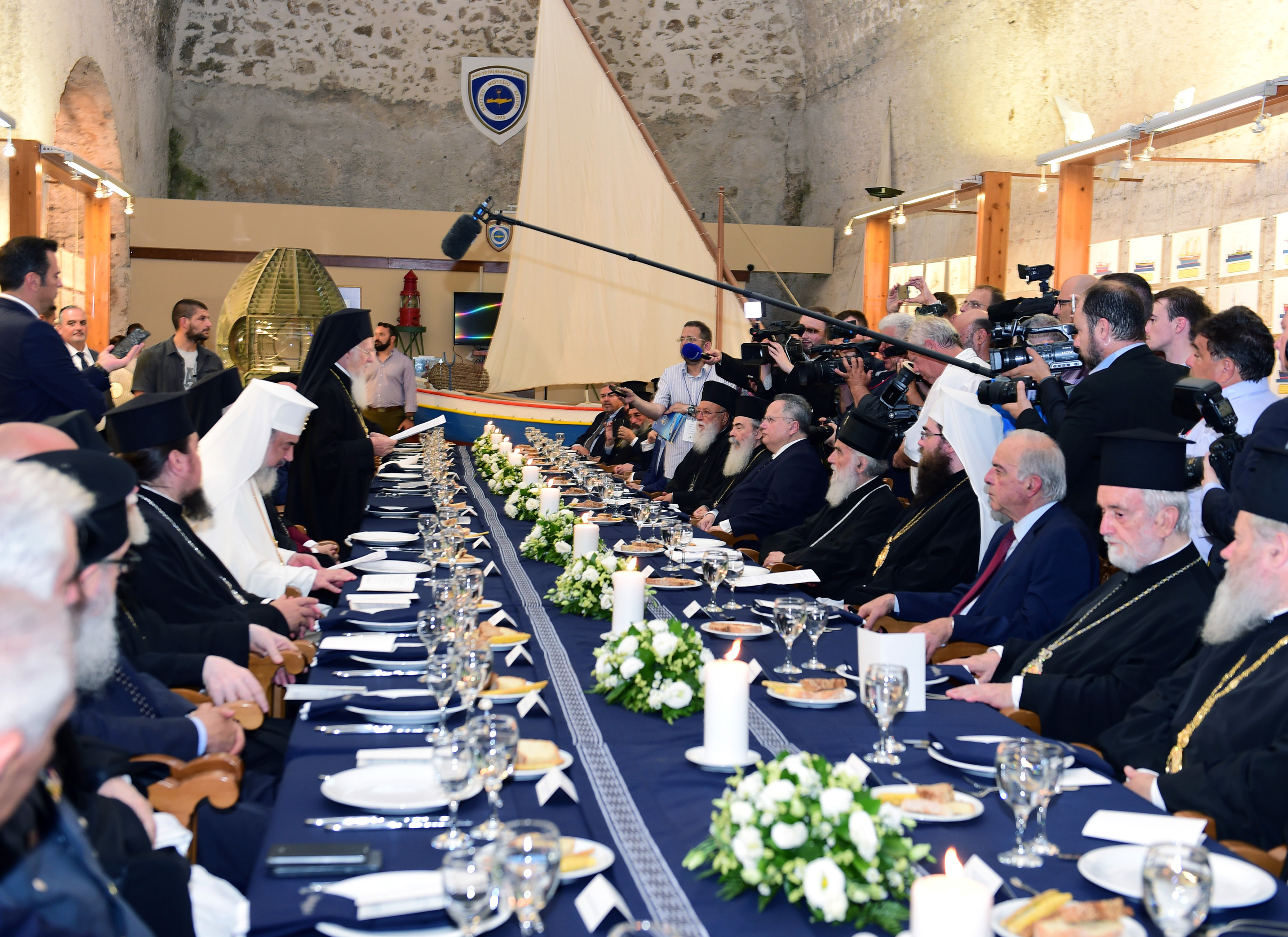 O Υπουργός Εξωτερικών κ. Ν. Κοτζιάς στο δείπνο που παρέθεσε προς τιμήν των Προκαθημένων, ενόψει της Αγίας και Μεγάλης Συνόδου της Ορθόδοξης Εκκλησίας Κρήτη, 16.06.2016 Πηγή: ΑΠΕ-ΜΠΕ